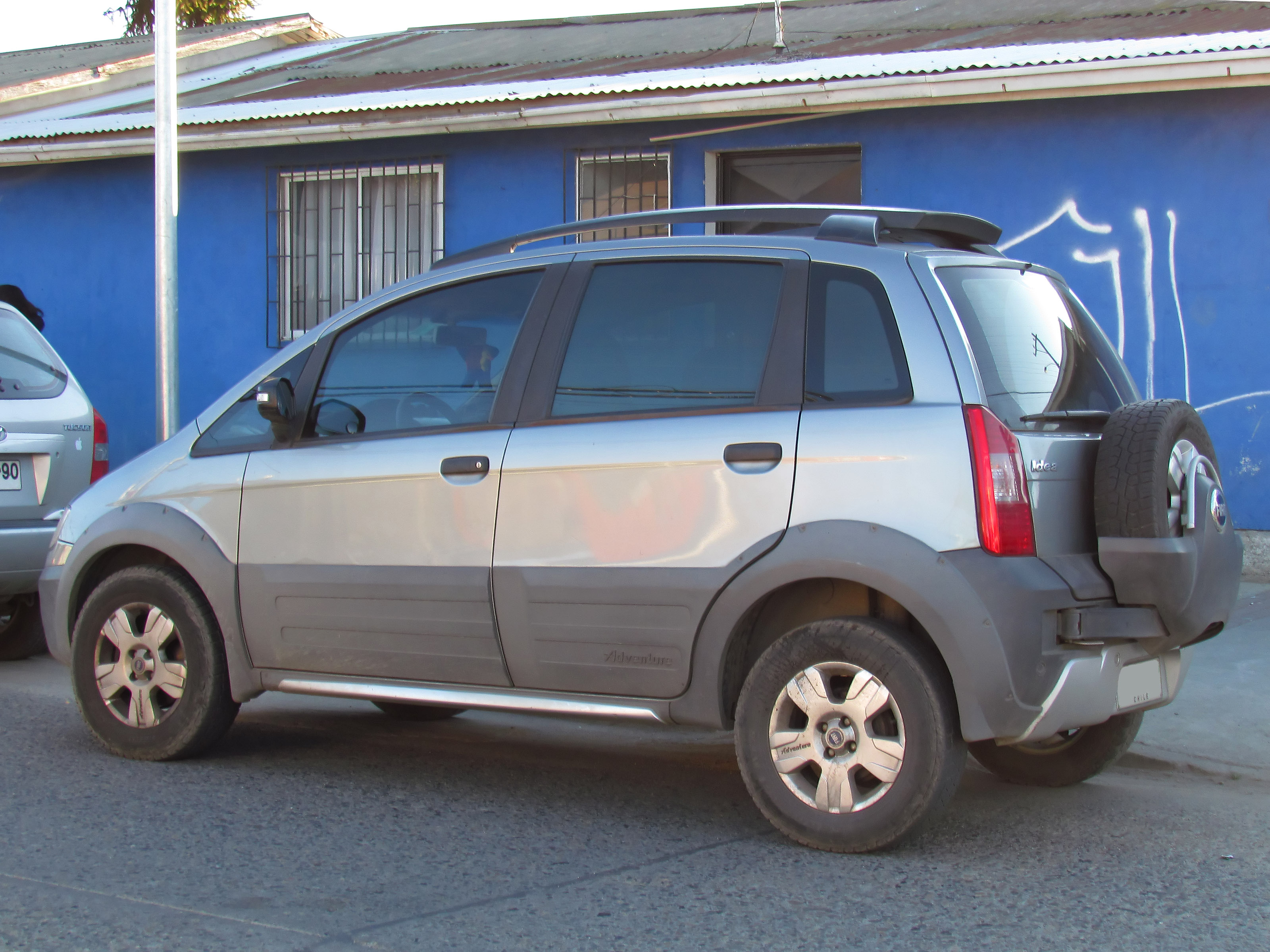 Una Fiat Idea 1.8 in allestimento Adventure per il mercato sud americano (fotografia scattata in Cile)